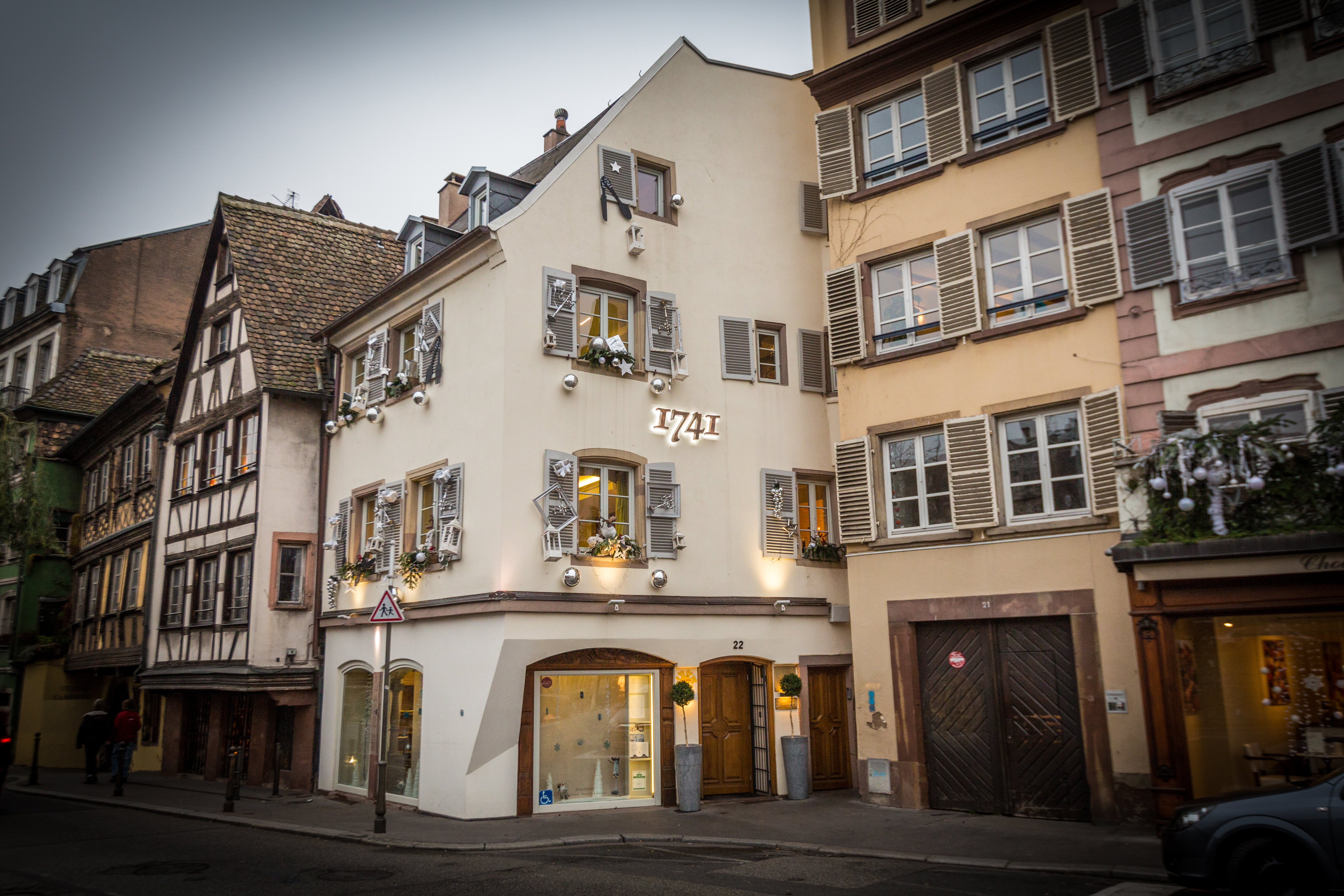 Strasbourg 22 quai des Bateliers nov 2014